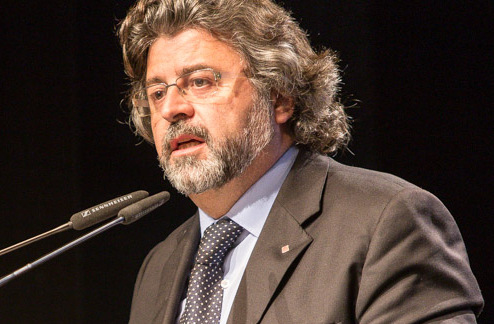 Les Jornades de la Catosfera són un cicle de xerrades en clau tecnològica que pretenen posar de manifest la Internet catalana i la seva activitat en les xarxes socials i les formes de comunicació 2.0.